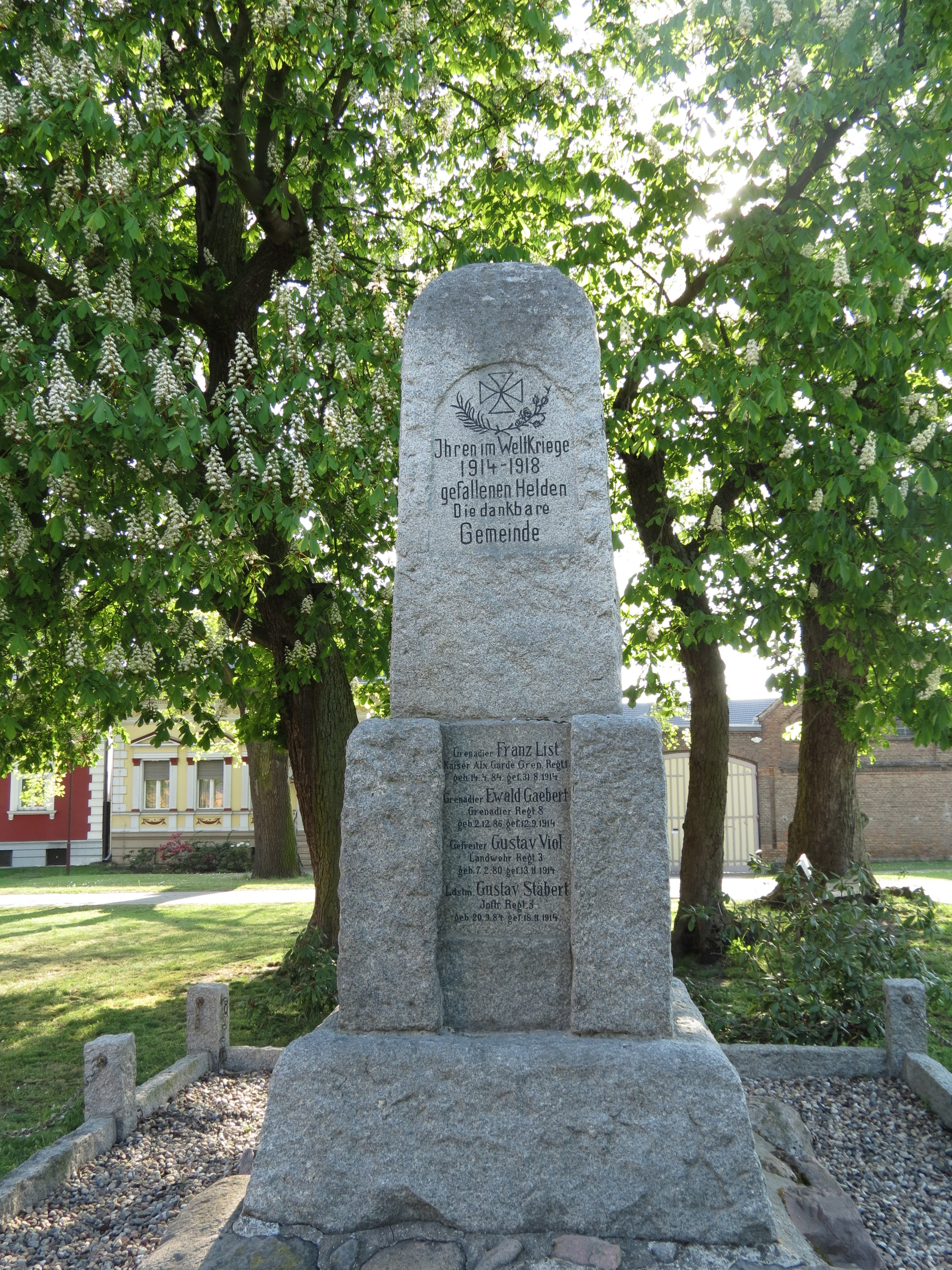 Lüdersdorf, Stadt Trebbin, Brandenburg, Deutschland, Dorfaue Denkmal für die Gefallenen des 1. Weltkriegs